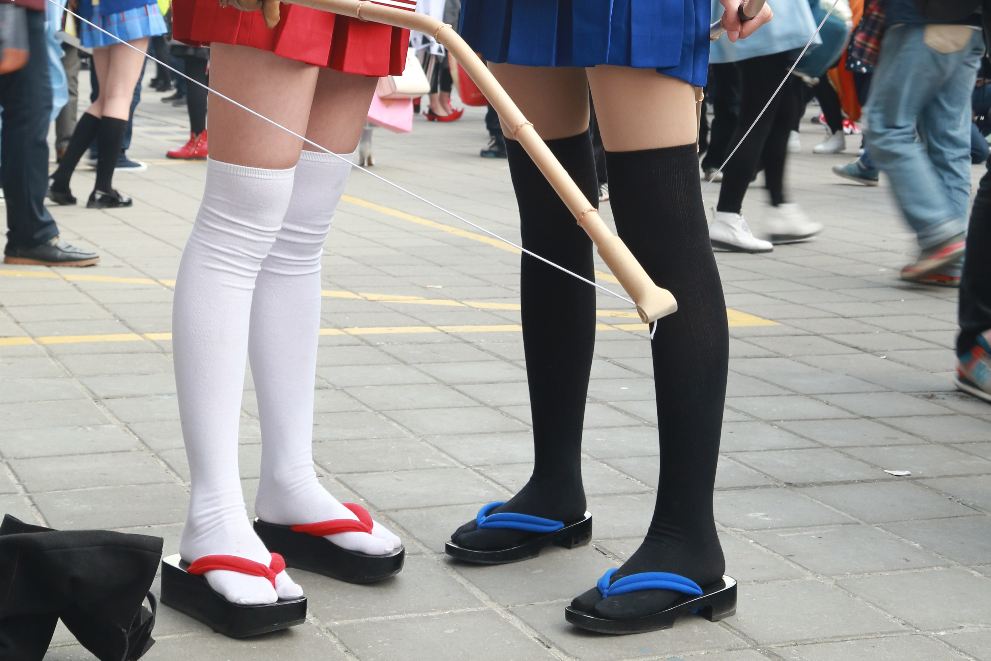 一种长筒版的分趾鞋袜，来源服装为舰队collection中的赤城和加贺